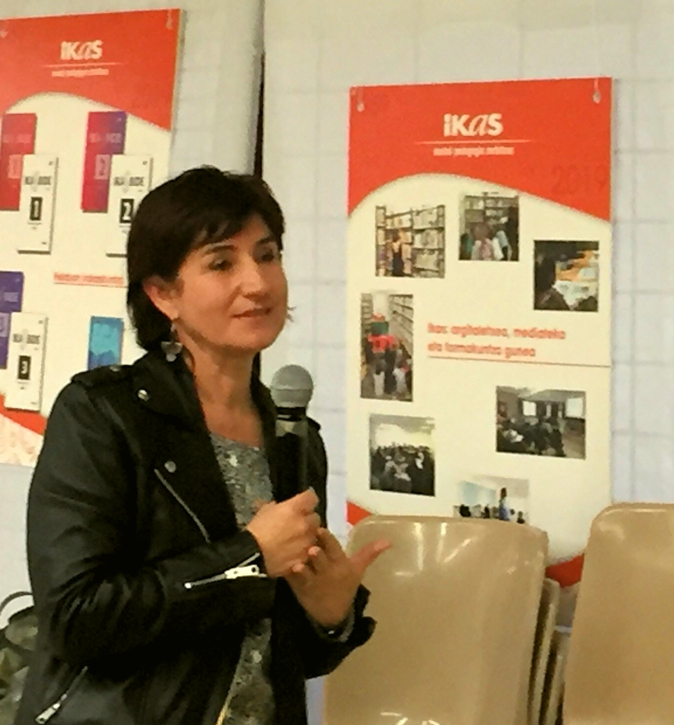 Ustaritzeko etxea.